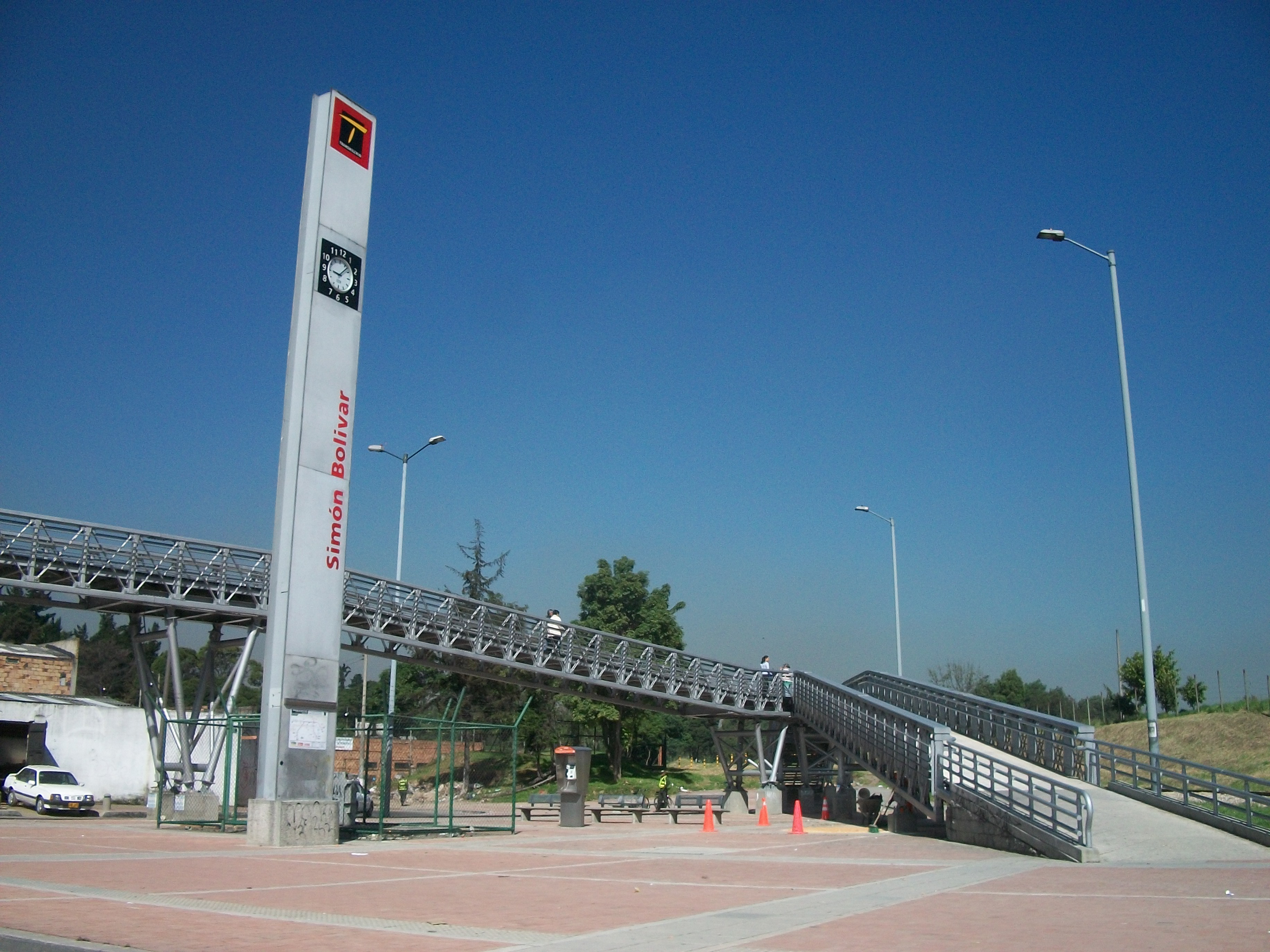 Estación de TransMilenio del Parque Simón Bolivar, en Bogotá.